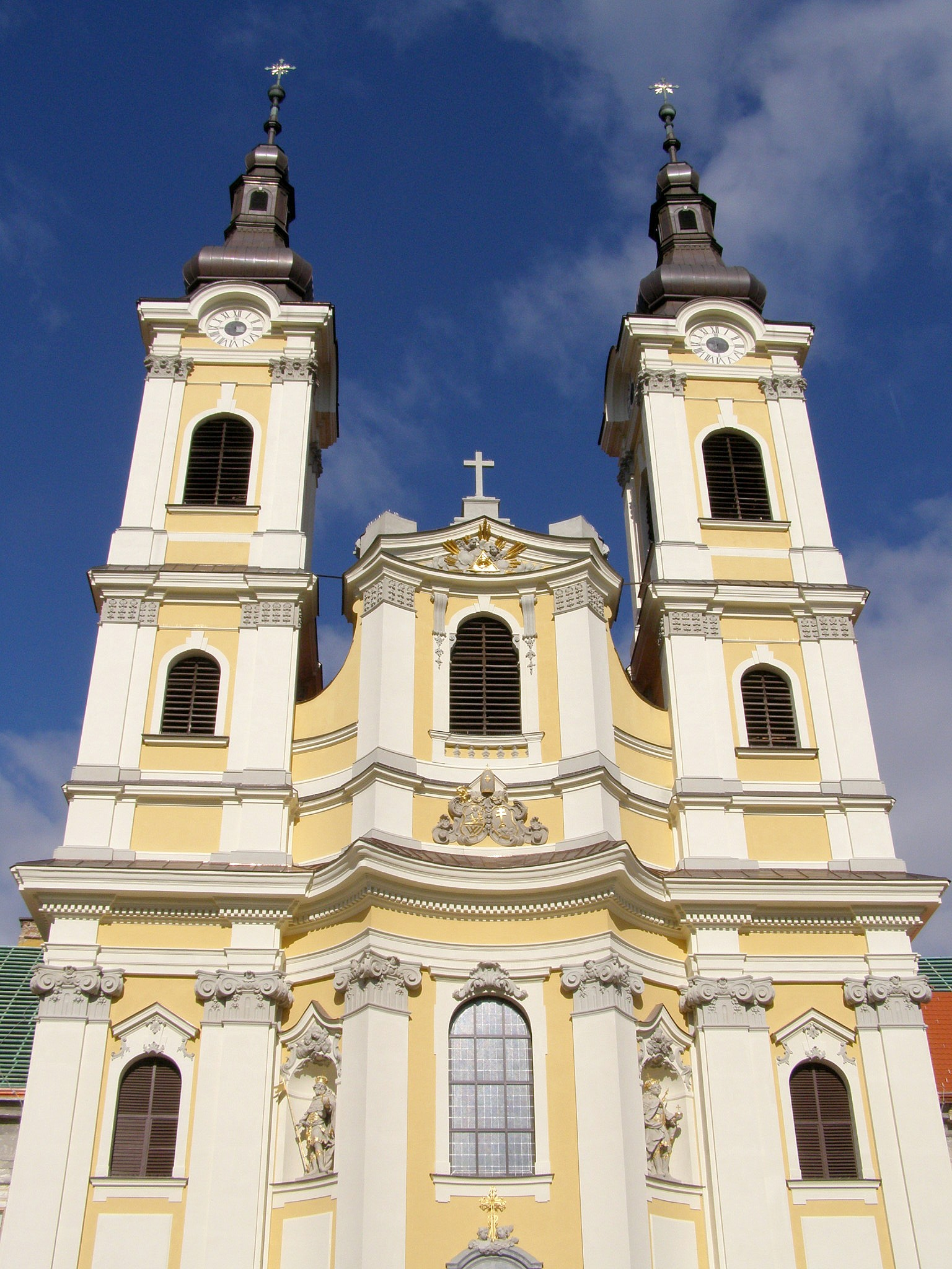 Priečelie kláštorného Kostola svätého Jána Krstiteľa